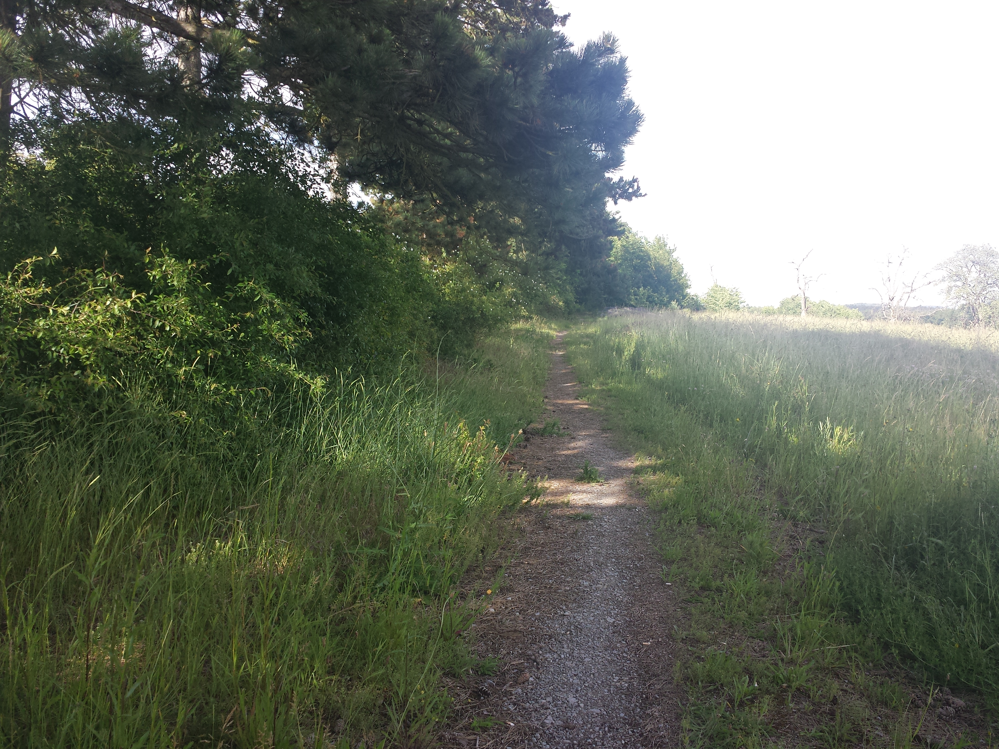 Ein Abschnitt des Jakobswegs Main-Taubertal im Bereich des Naturschutzgebietes Brachenleite bei Tauberbischofsheim.